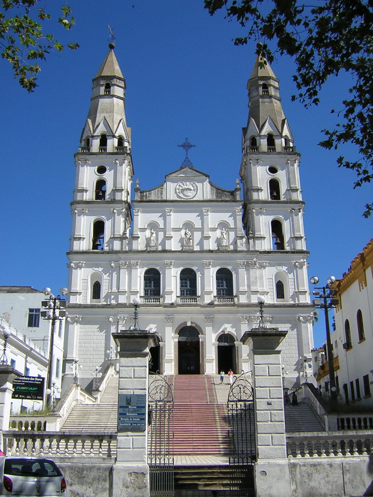 Igreja Nossa Senhora das Dores em Porto Alegre